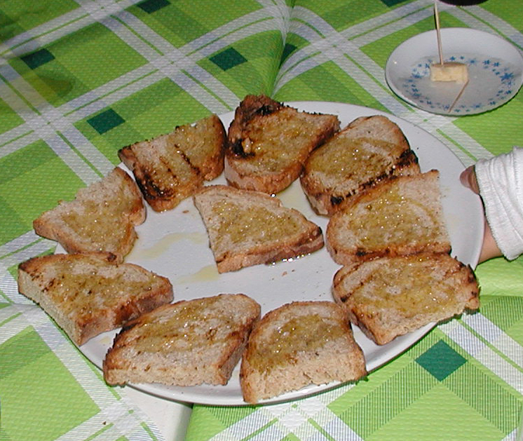 Bruschetta mit Öl